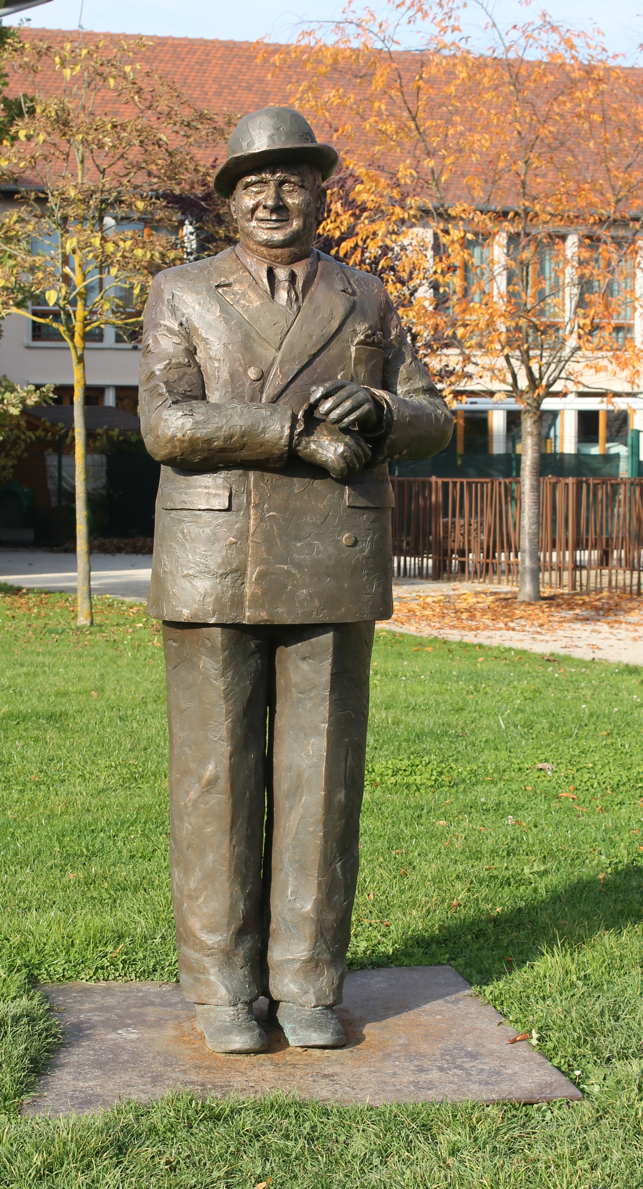 Bronzeplastik "Ettore Bugatti" von Marièle Gissinger (2009) in Molsheim, parc des Jésuites